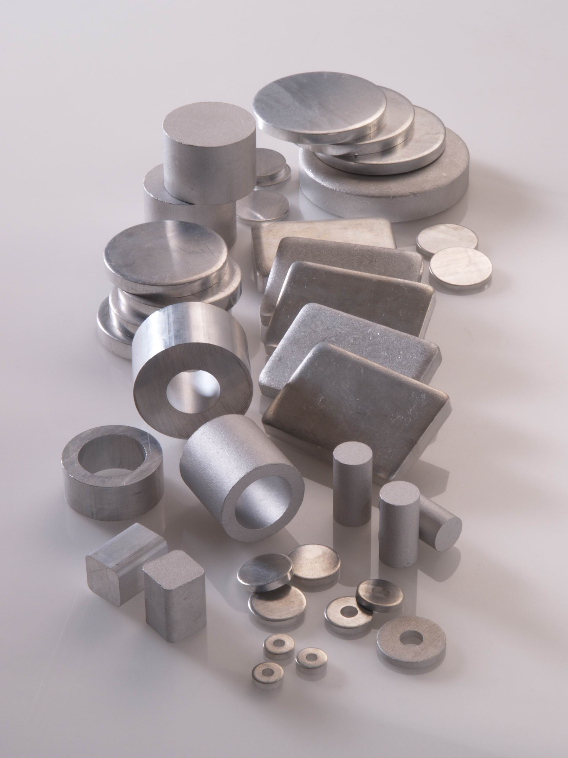 Aluminiumbutzen